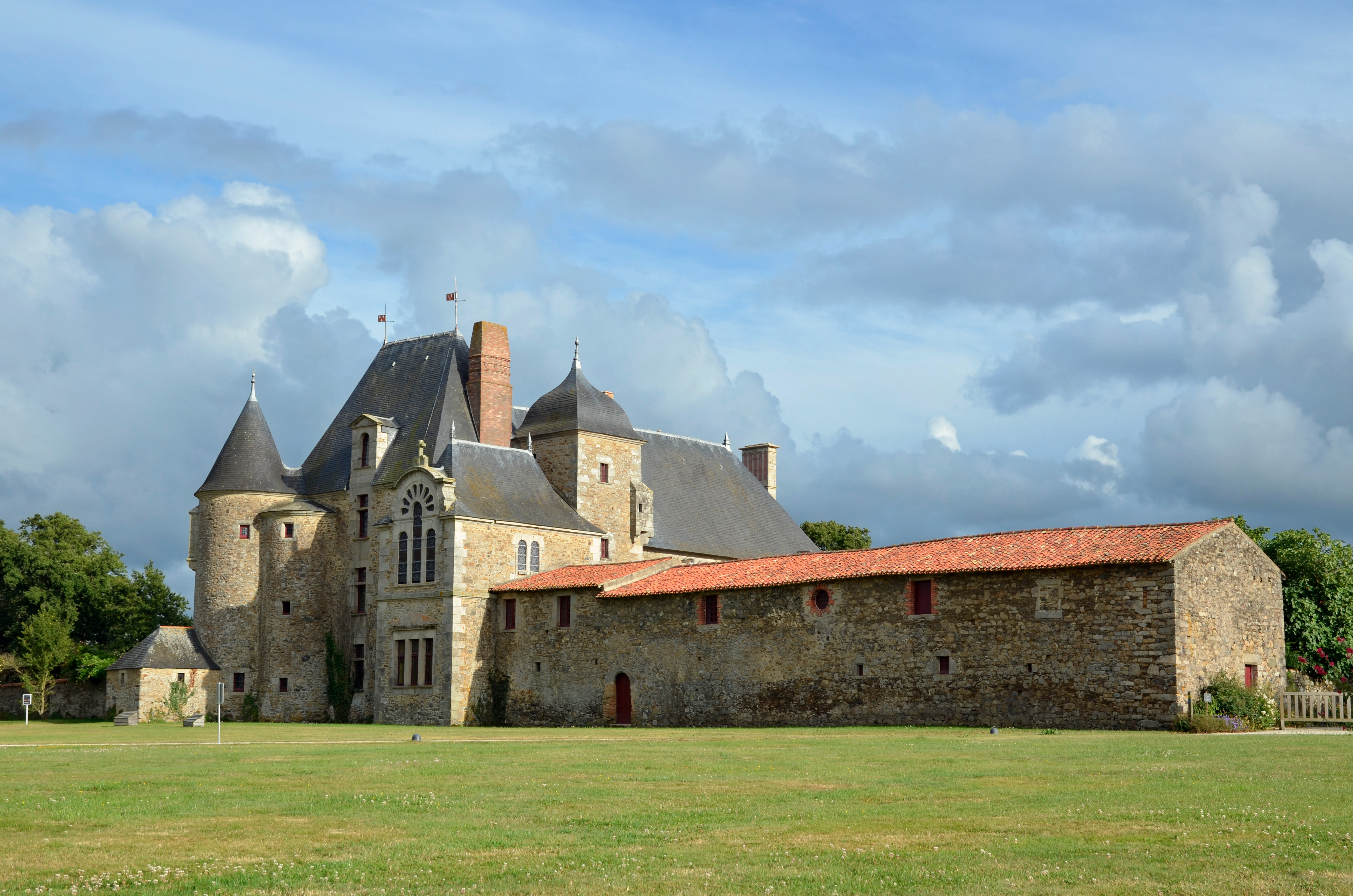 Château de la Chabotterie - Saint-Sulpice-le-Verdon, Vendée .